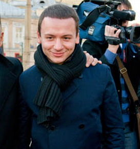 Александр Олешко на премьере фильма «Обитаемый остров: СХВАТКА» 21 апреля 2009 года в кинотеатре «Пушкинский»